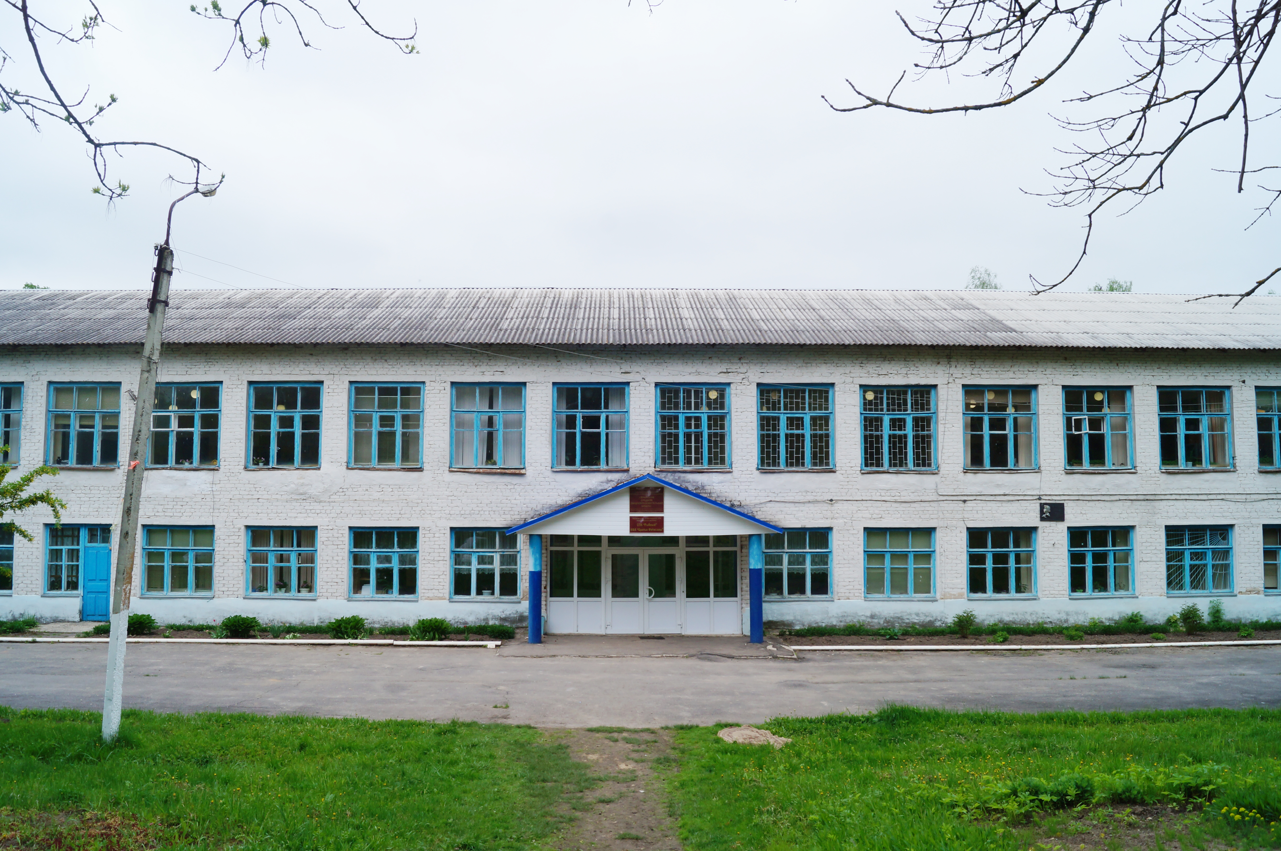 Школа в с. Брынь Думиничского района Калужской области